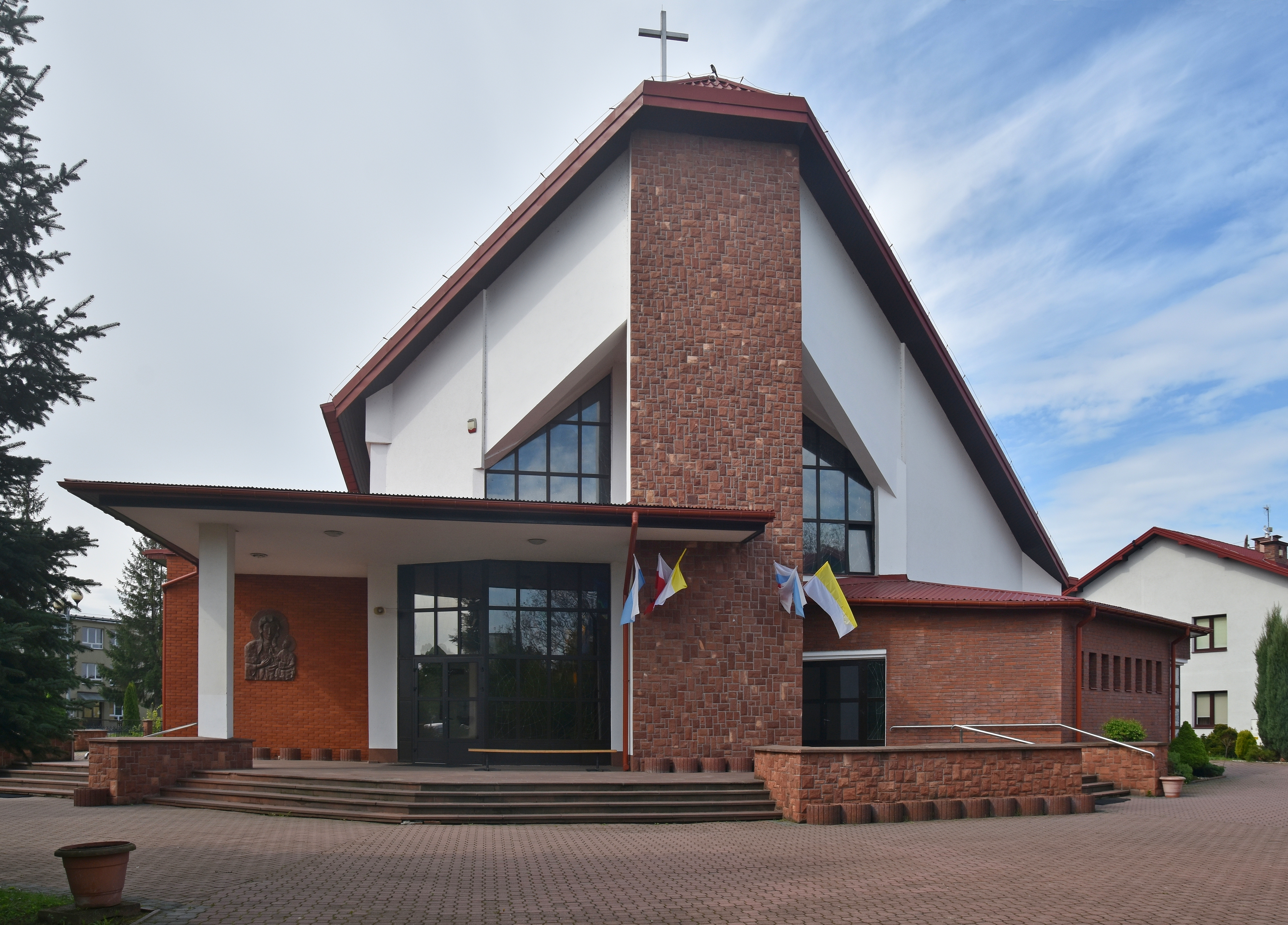 miasto Jasło